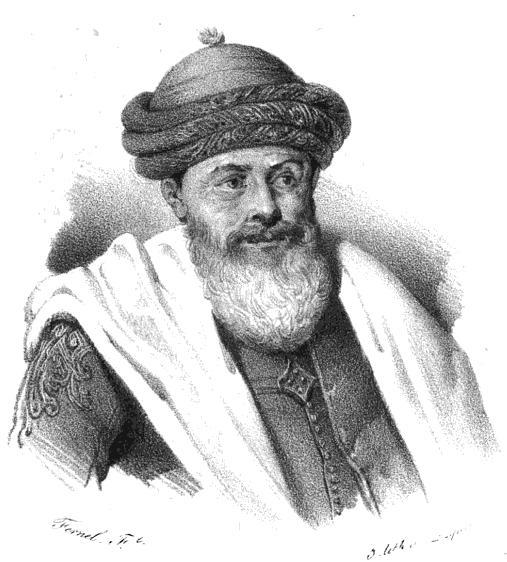 "Hussein Pacha, dernier Dey d'Alger. Dessiné d'après nature à la Cassauba, le 7 juillet 1830."